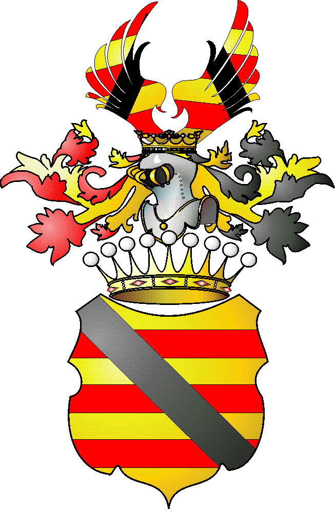 CoA of family Broel-Plater, odmiana wg.herbarza Wilczyńskiego i Malinowskiego (prawdopodobnie fantazyjna)